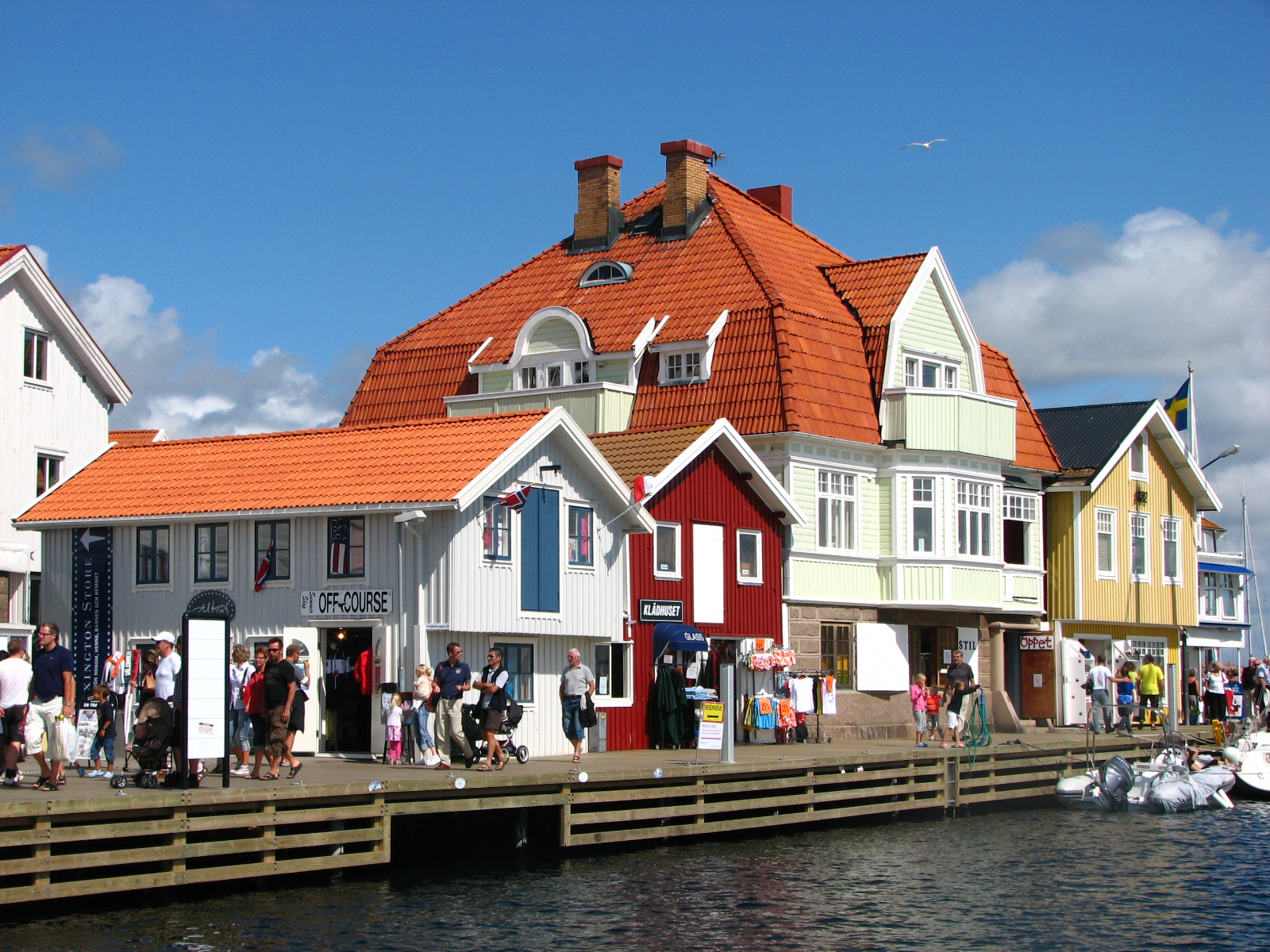 Smögenbryggans östra entré